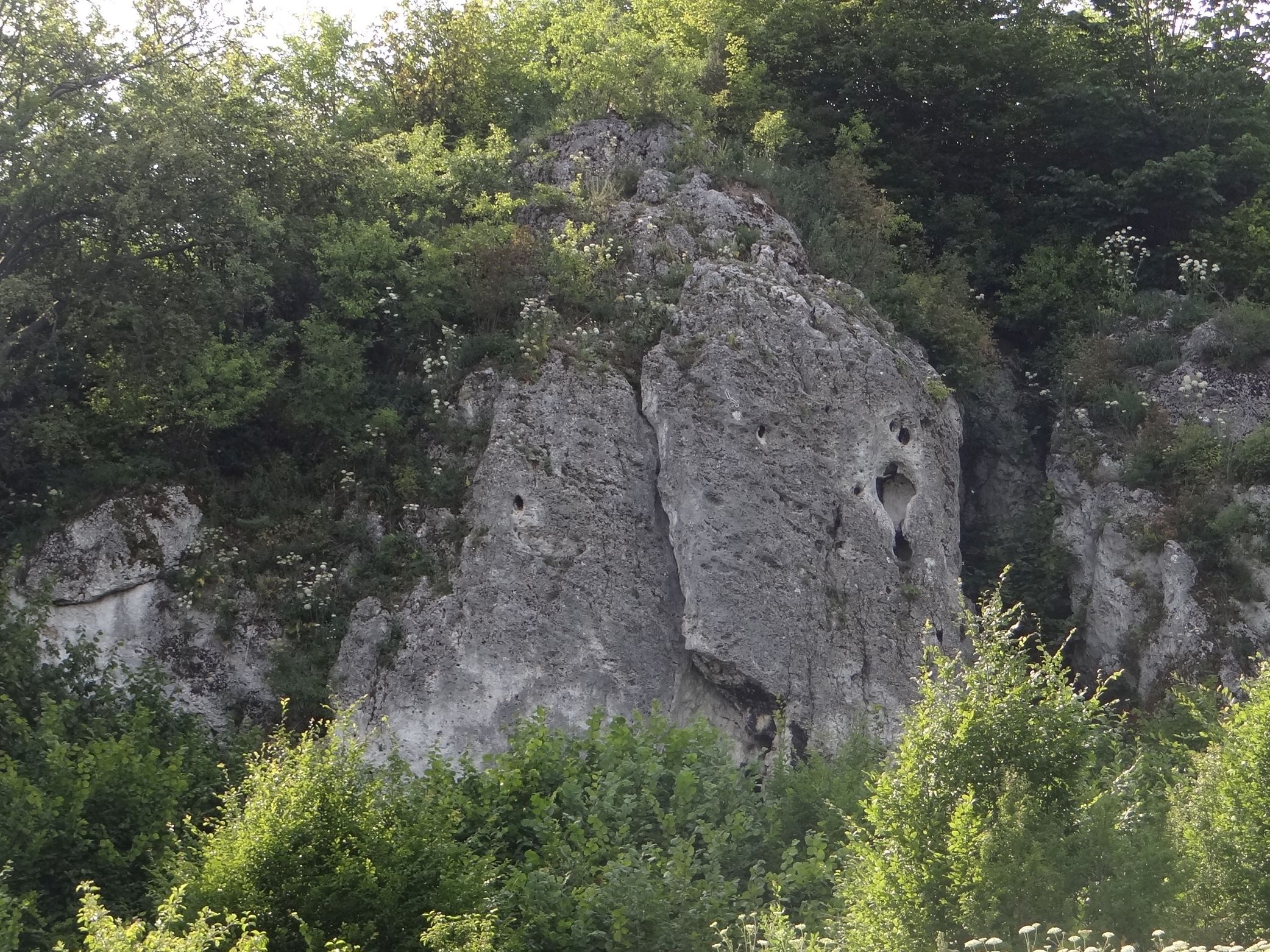 Dziurawa Turnia w grupie skał Rzękowickich